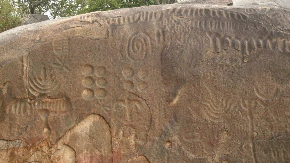 Essa é uma parte do paredão ou painel vertical do conjunto rochoso da Pedra do Ingá, na Paraíba, repleto de sinais inscritos na pedra dos quais não se tem ideia do significado.